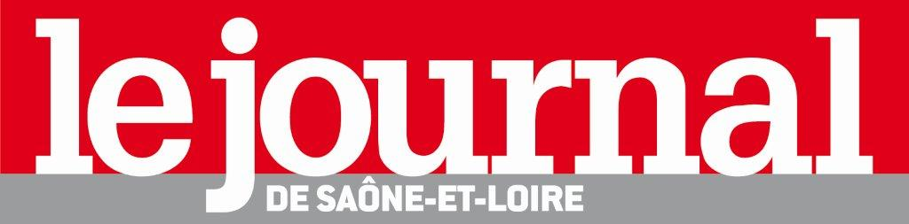 Logo du Journal de Saône-et-Loire.